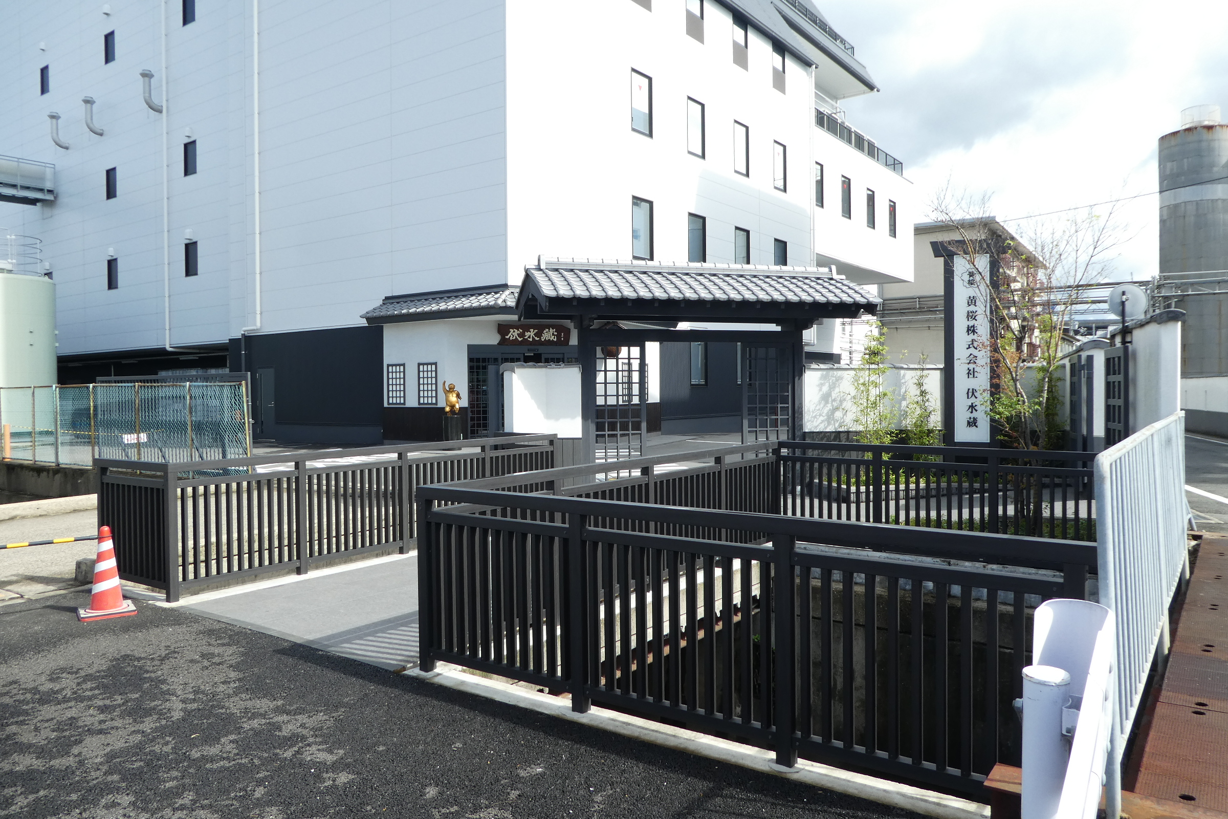 黄桜株式会社本社内に所在する「伏水蔵」（ふしみぐら）